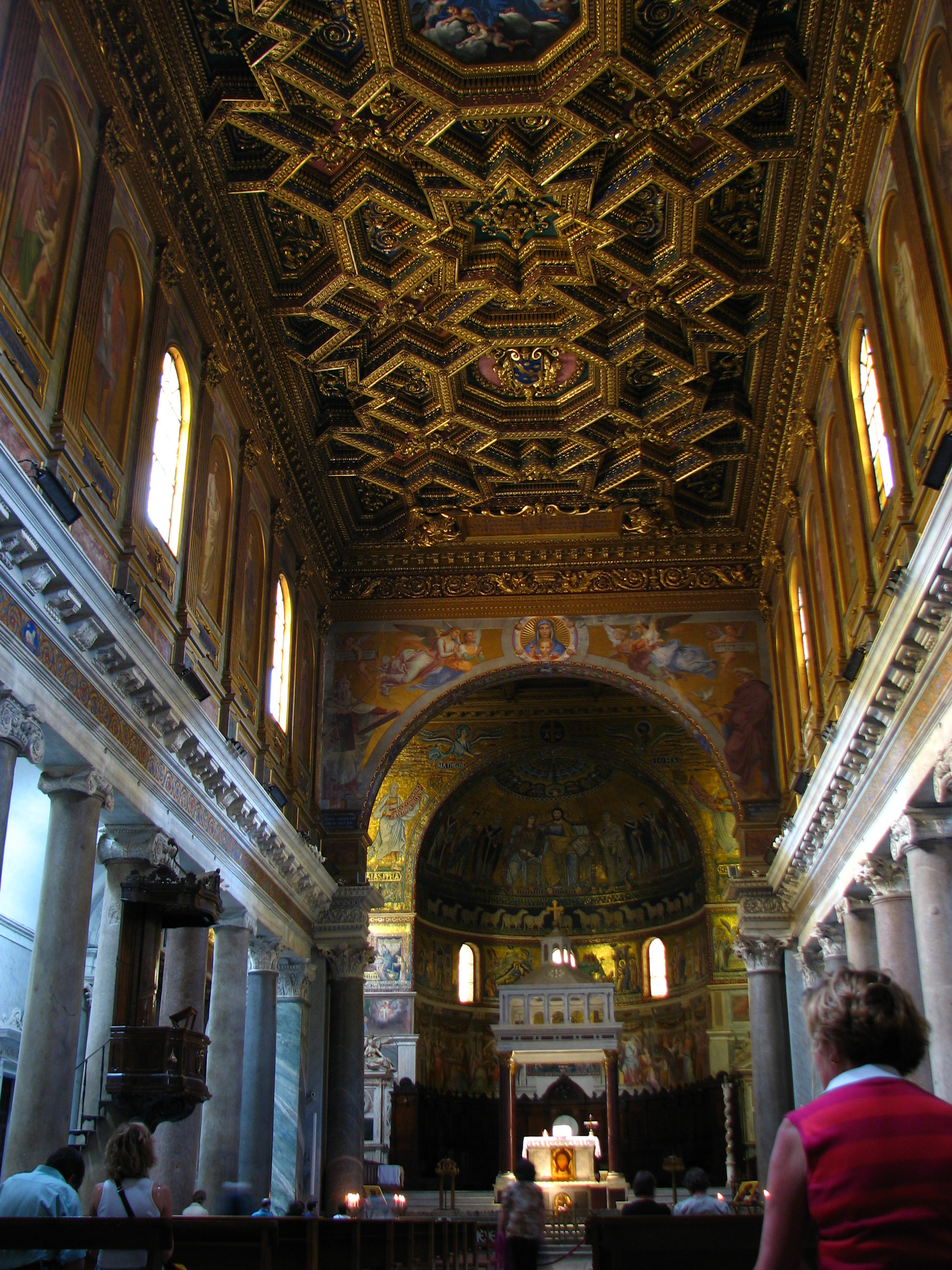 S. Maria in Trastevere - Roma, Italia.